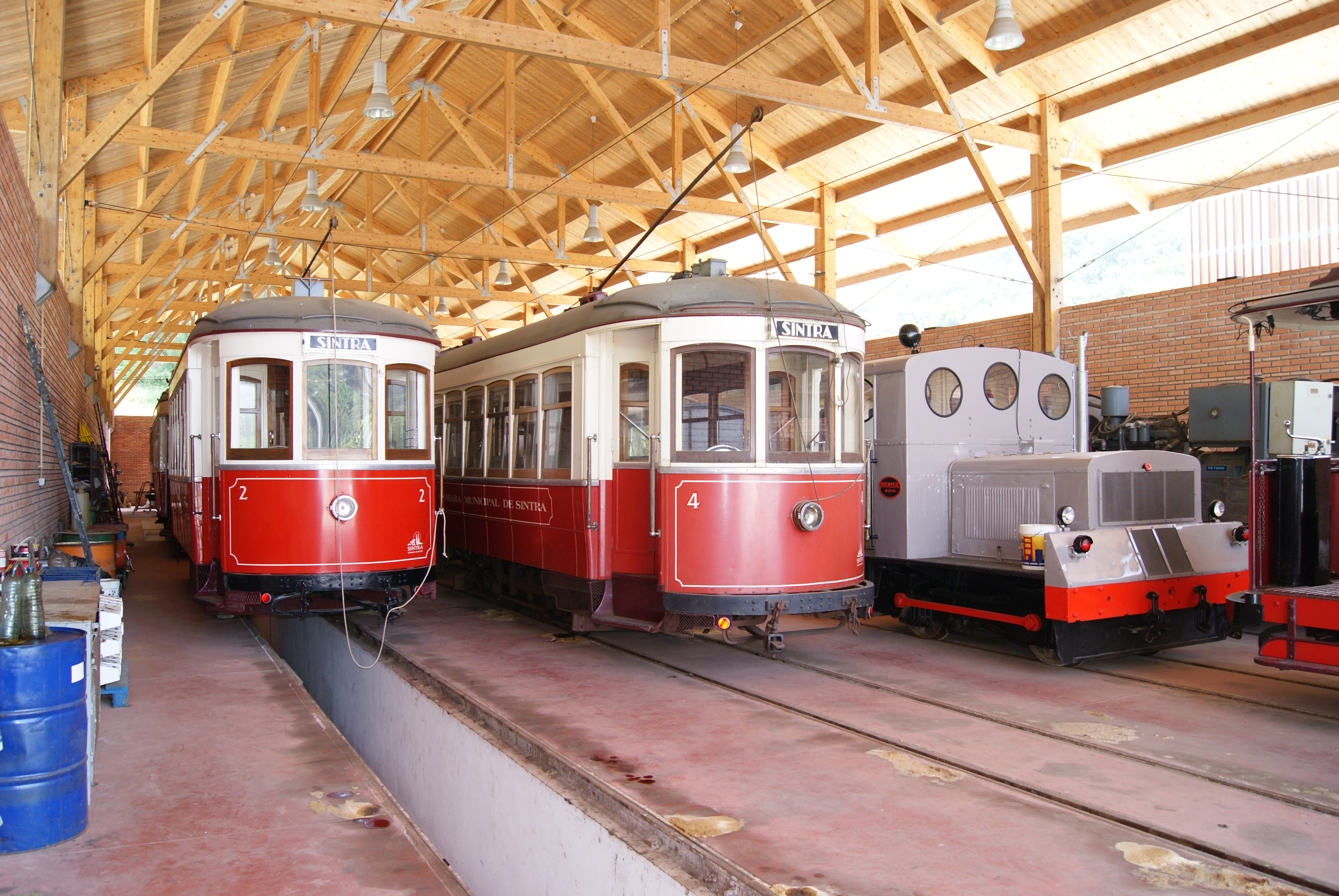 Magnifique ligne de trams avec des employés très aimables, points négatifs, trouver le départ du tram depuis la gare du train, car vous ne trouverez aucune indication, et pour les amateurs de trams, pas de cartes postales, pas de revues sur le tram, pas de maquettes de trams, comme pour les trams de Lisbonne,etc. "Dommage".